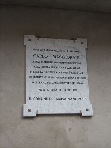 Targa in onore di Carlo Maggiorani nel comune di Campagnano di Roma